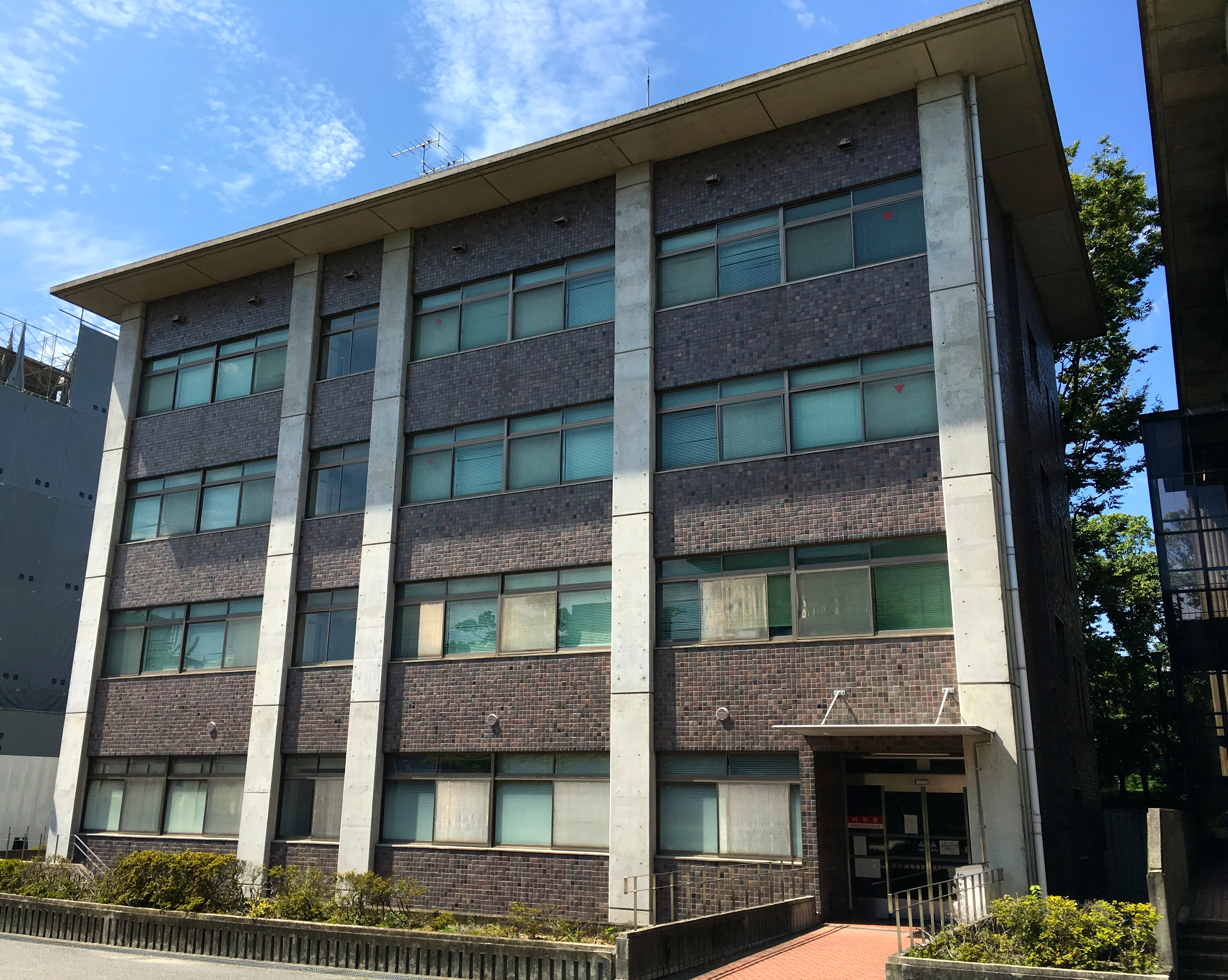 The photo was taken by me myself on September 10, 2016.